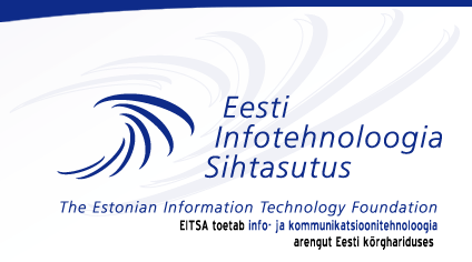 EITSA logo